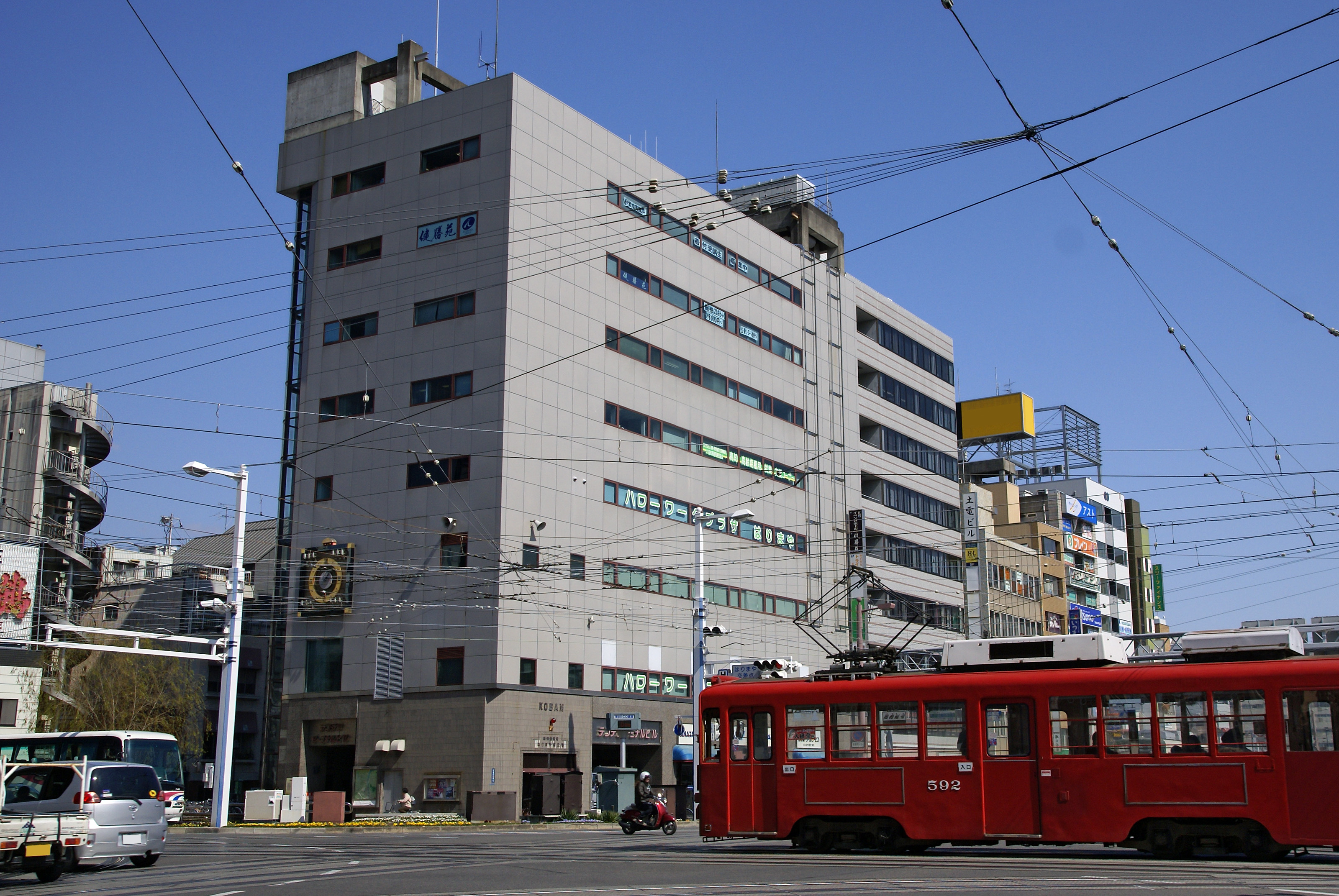 Dentetsu-Tāminarubiru-mae Station in Kōchi, Kōchi Prefecture, Japan